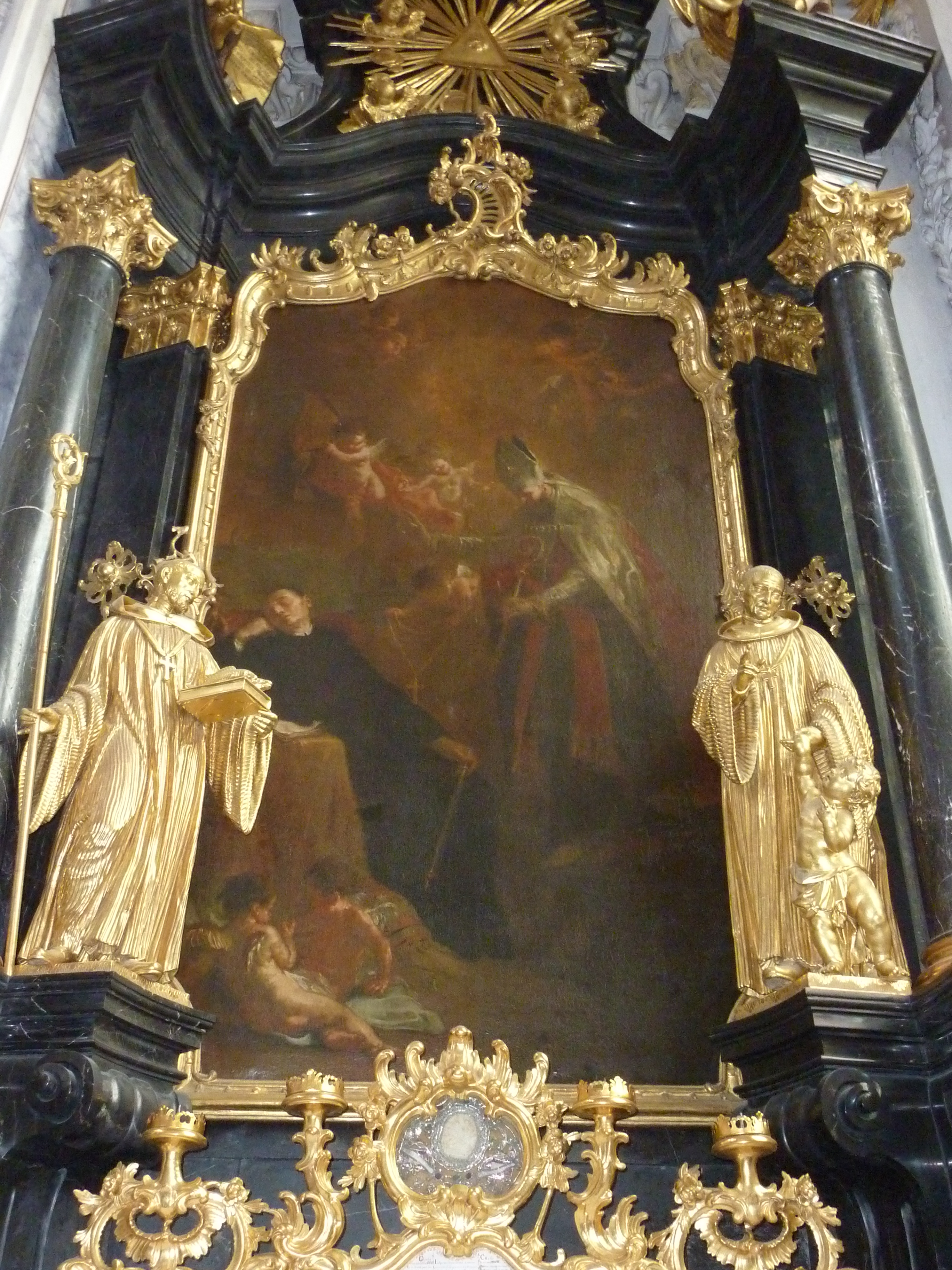 Stiftskirche Göttweig, Niederösterreich - Gemälde hl. Altmann / Traum des sel. Hartmann (Martin Johann Schmidt 1773) am 1. südlichen Seitenaltar